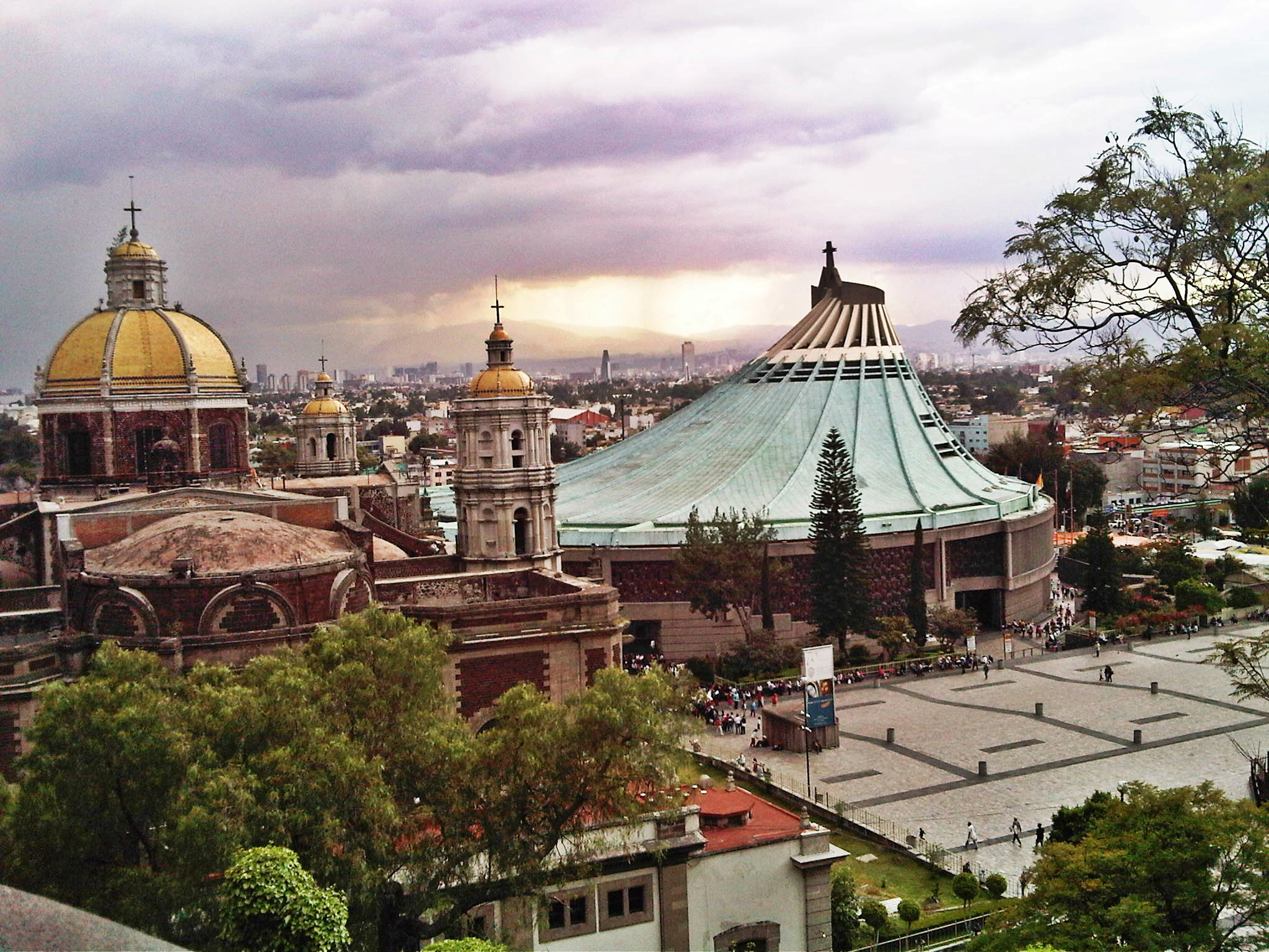 Conjunto Villa de Guadalupe